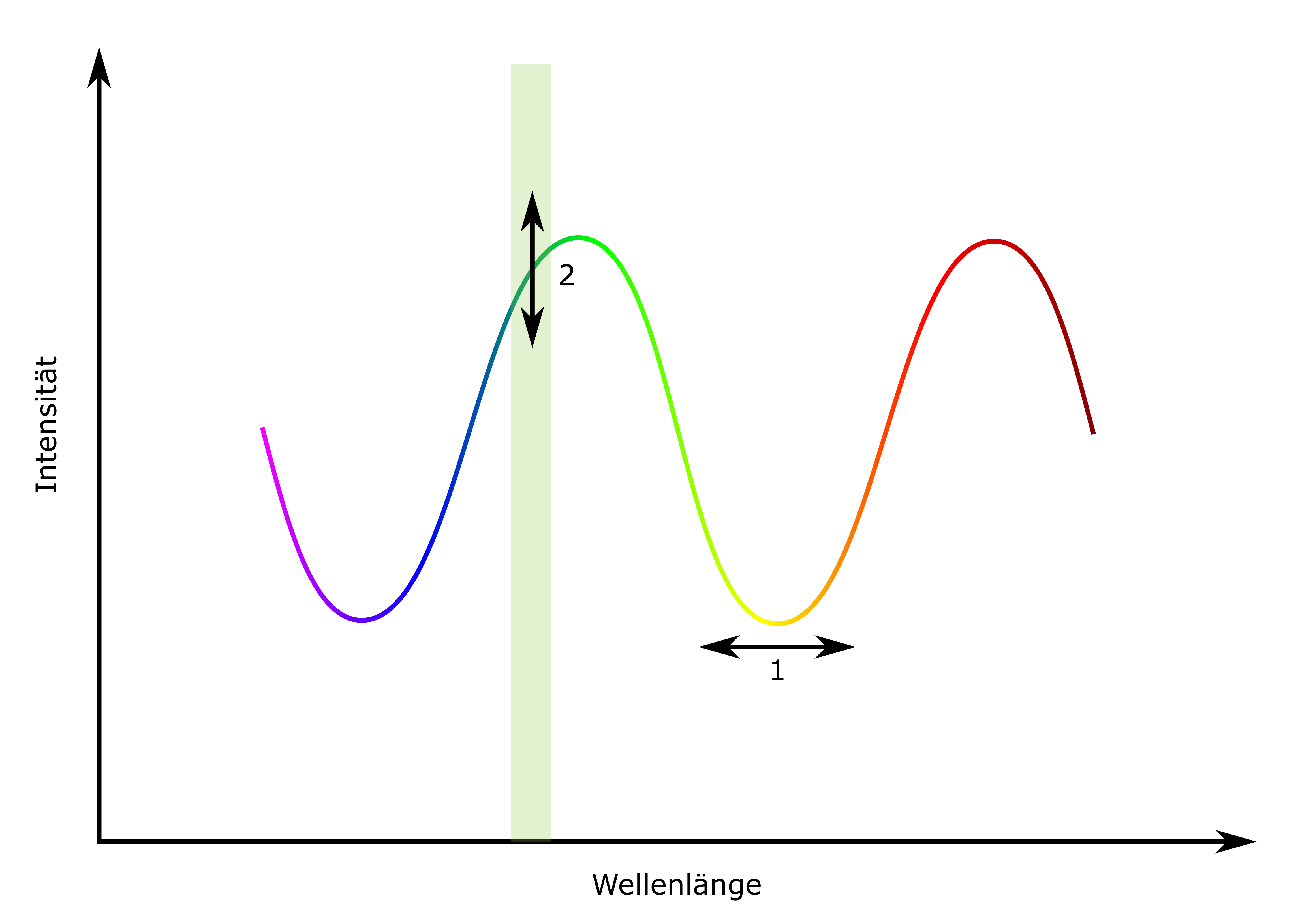 Prinzip der spektralen Interferometrie